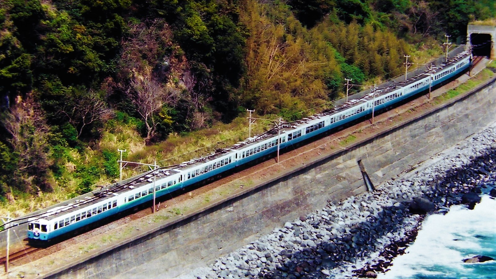 伊豆急行電鉄100系電車